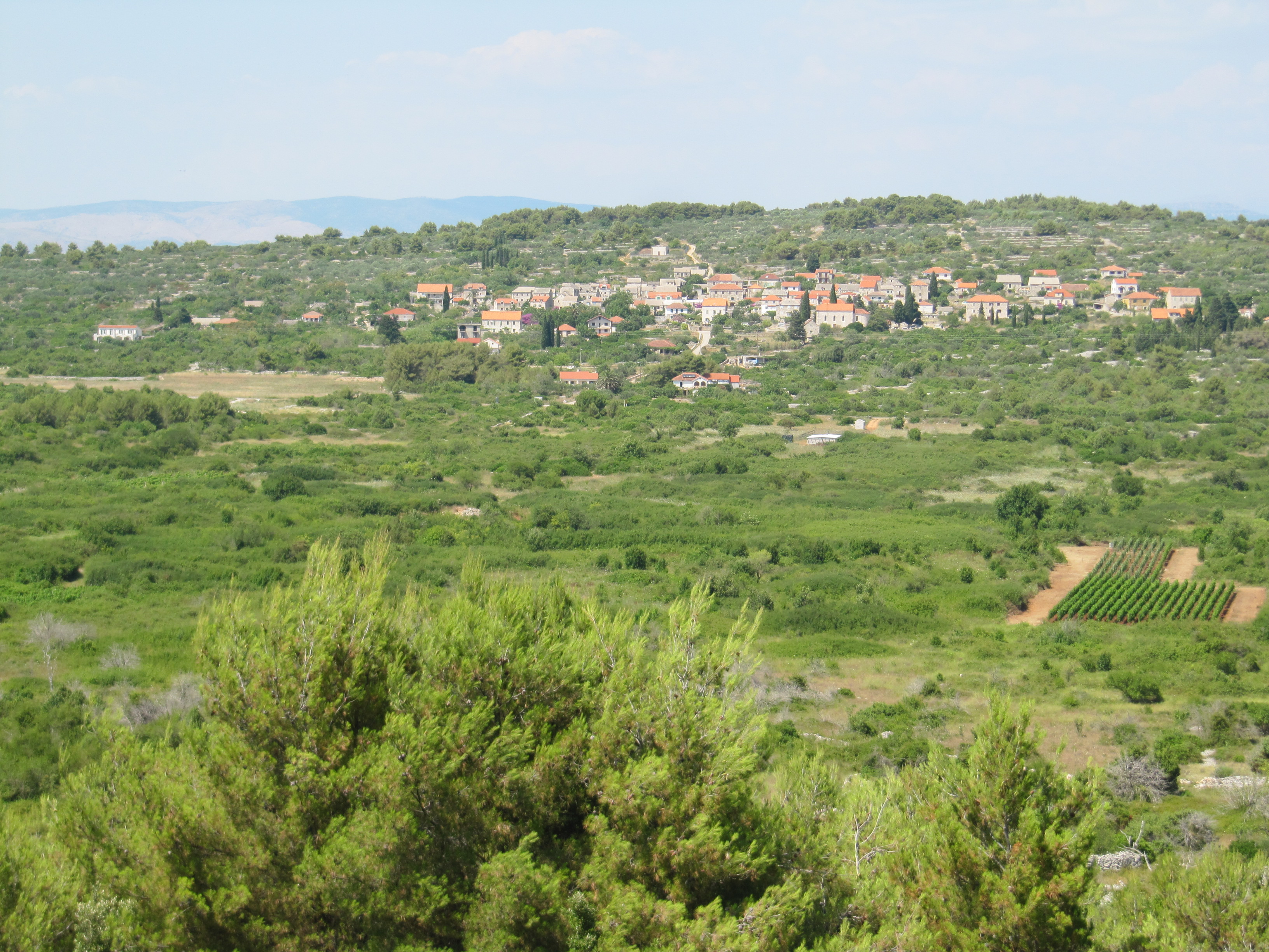 Ishulli Sholta, me katundin Srednje Selo në sfond